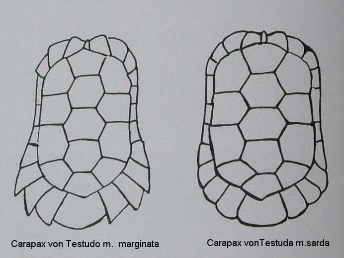 Griechische und sardische Form der Breitrandschildkröte